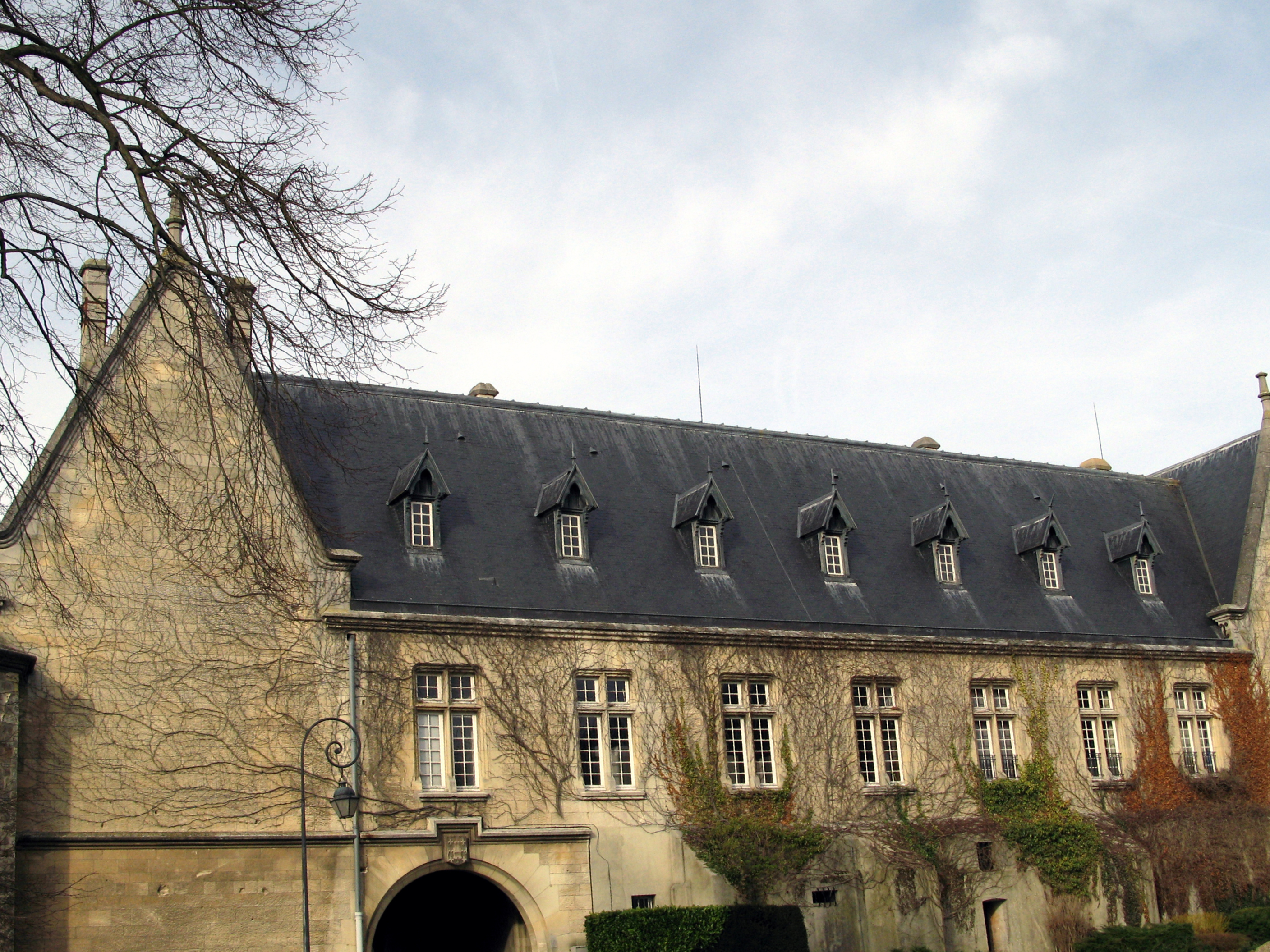 Montdidier (Somme, France) - Le Prieuré, qui fut détruit lors de la Première Guerre mondiale, a été reconstruit vers 1930. Le bâtiment, qui avait fonction de Palais de Justice, est devenu le Centre des Impôts en 1965. . .